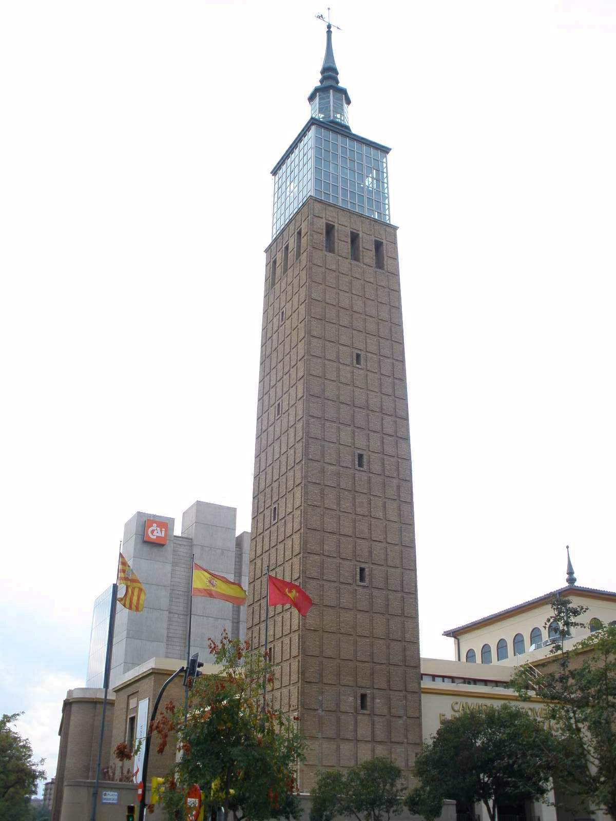 Zaragoza - Camara de Comercio e Industria